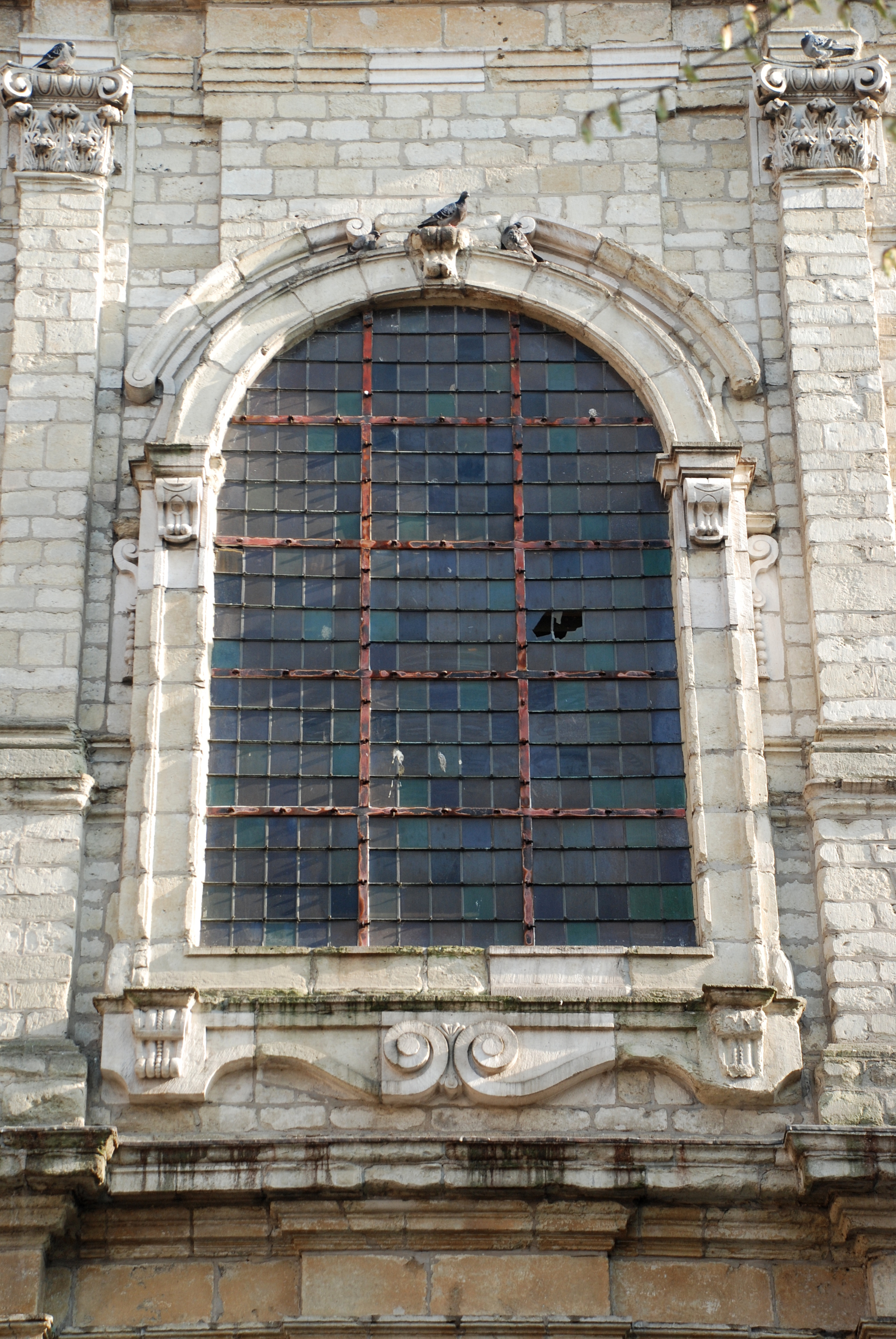 Belgique - Bruxelles - Chapelle Sainte-Anne de Bruxelles